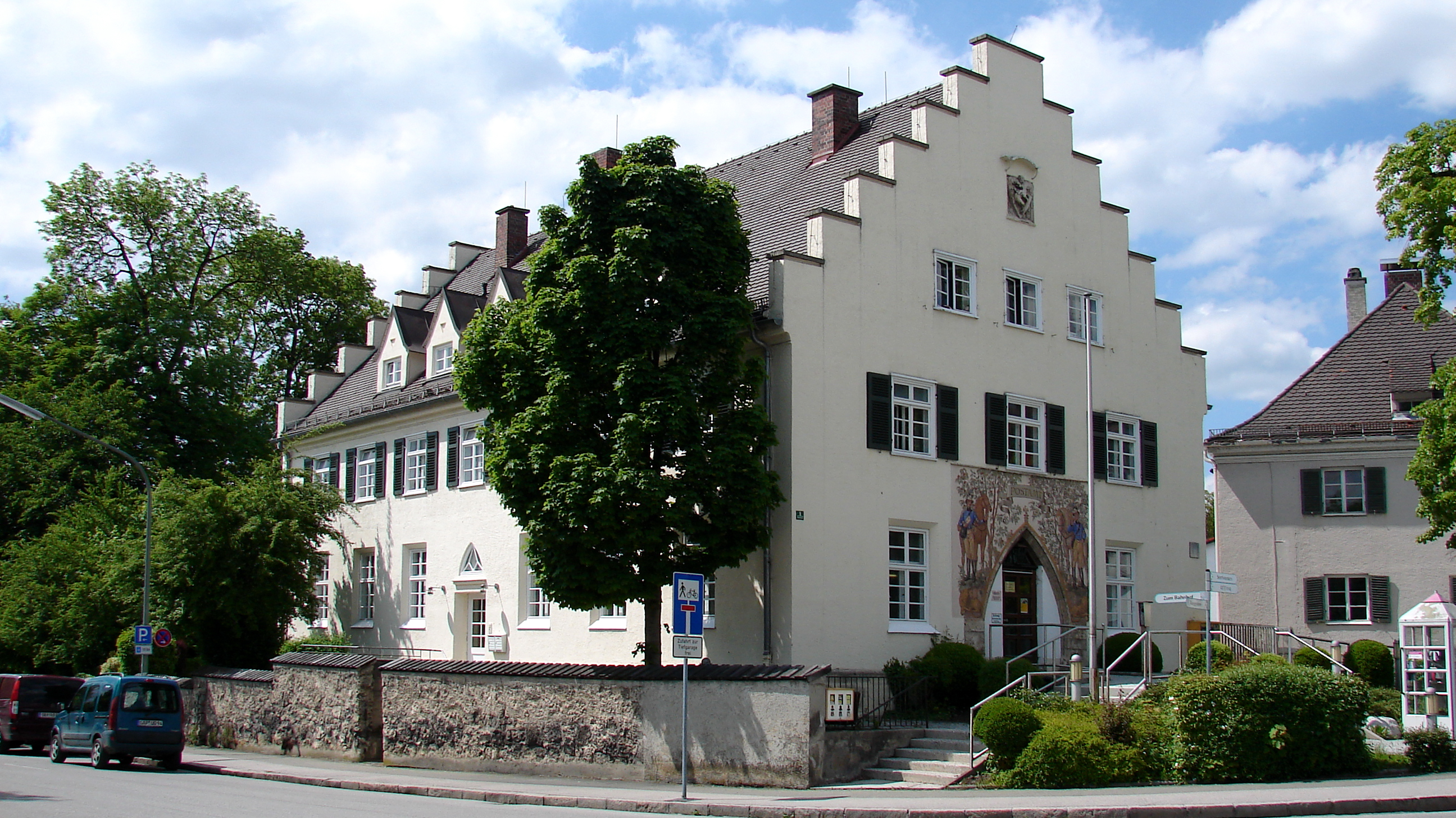 Zweigeschossiger historisierender Satteldachbau mit Treppengiebeln und Fassadenmalerei, von Franz Holzhammer, bez. 1923.